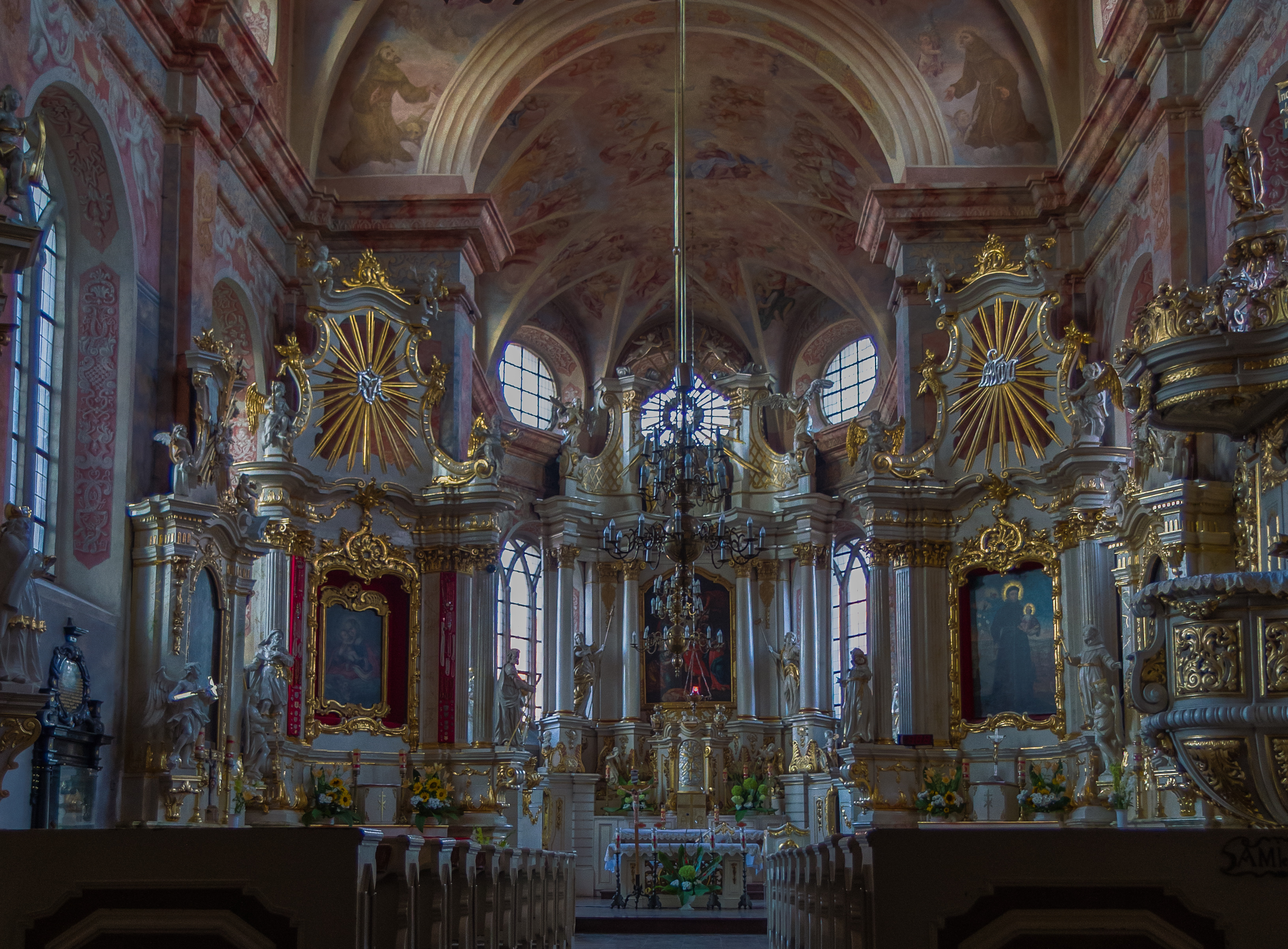 Wschowa, kościół p.w. św. Józefa, 1638-1644, 1742-1745